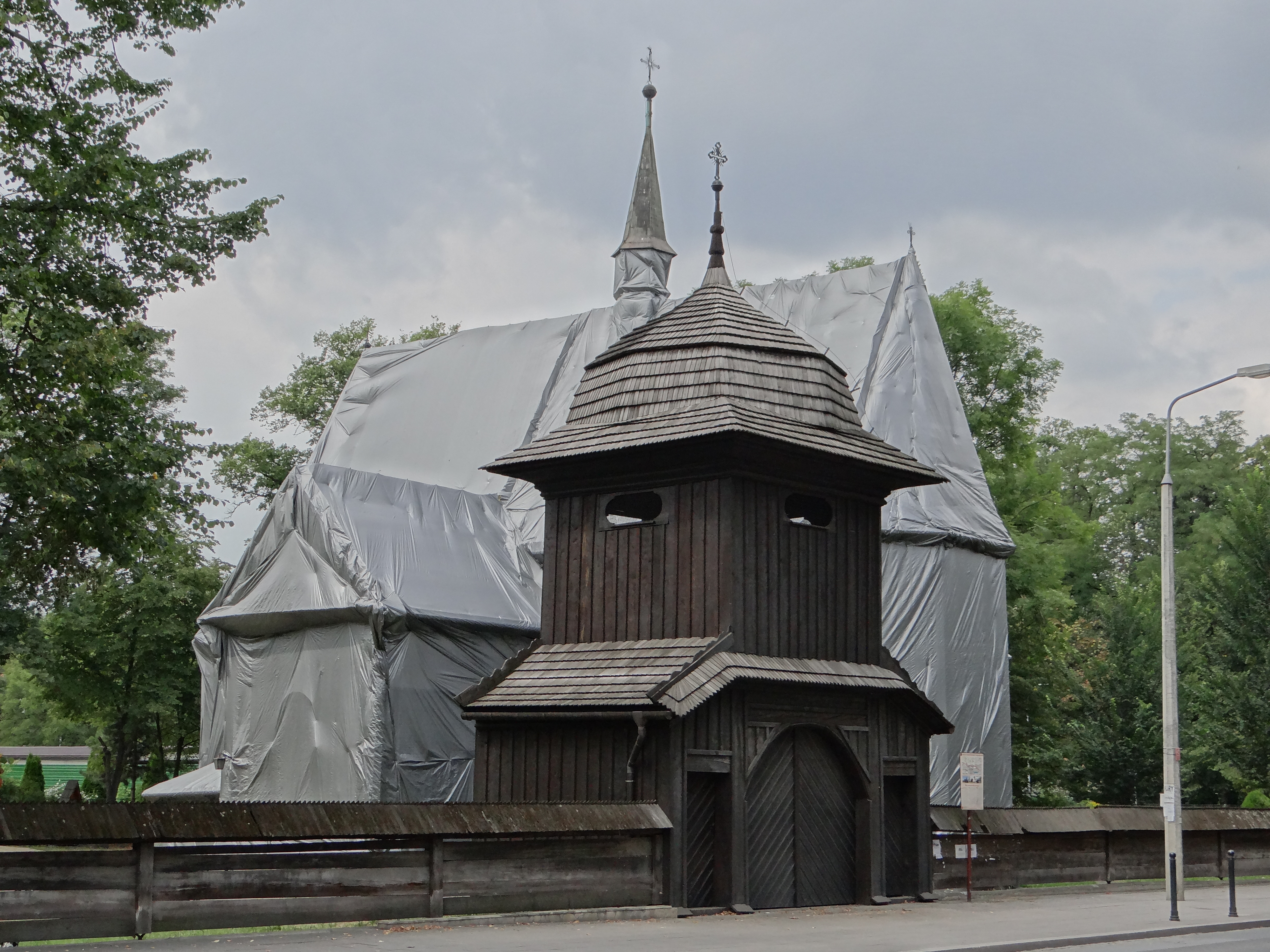 Kościół Narodzenia Pańskiego i św. Bartłomieja Apostoła w Krakowie (Mogiła) podczas fumigacji w 2017 roku.